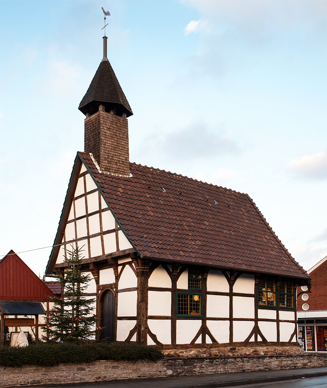 Laurentiuskapelle in Nammen This is a photograph of an architectural monument.